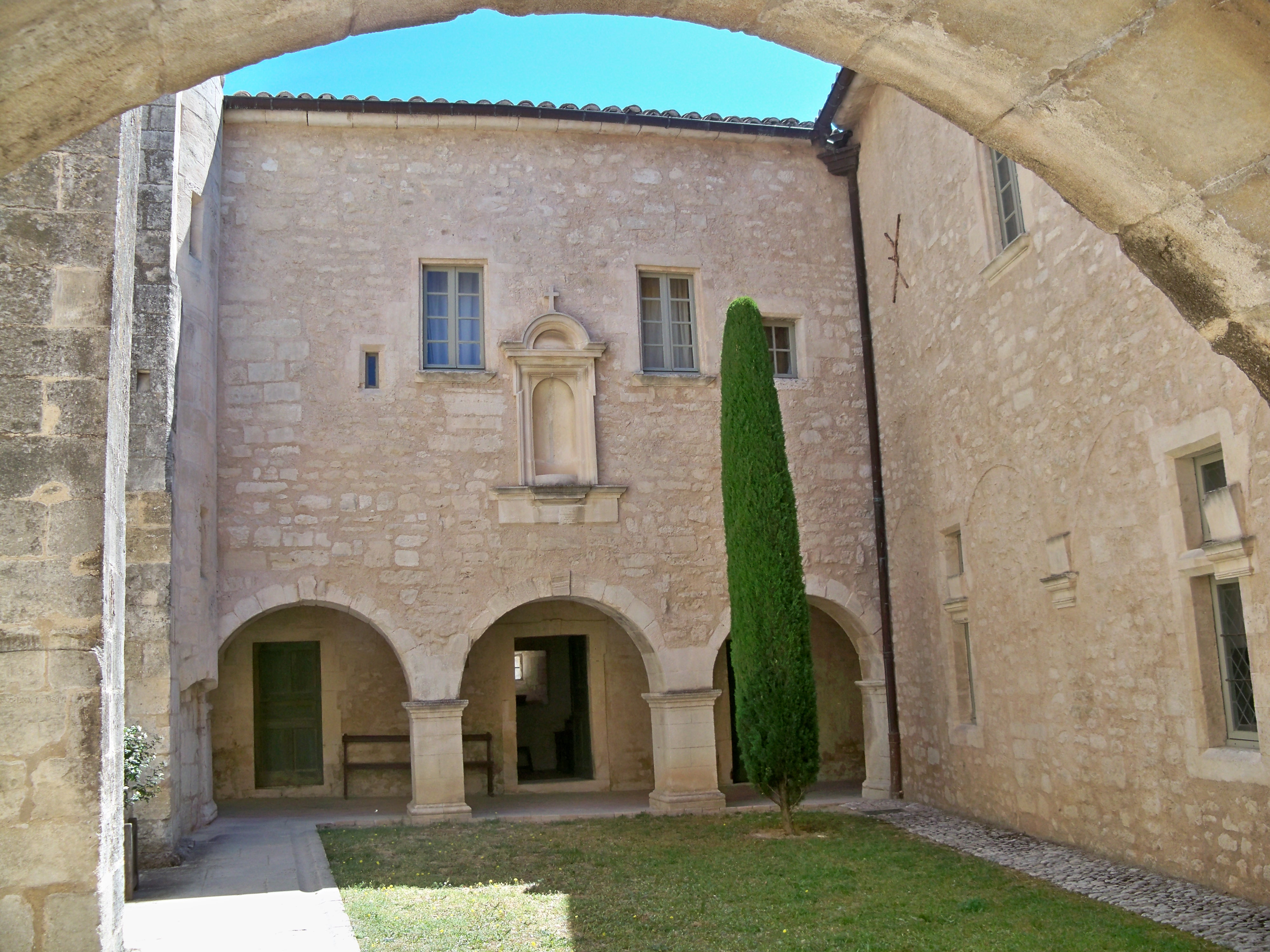 Cloître de l'Abbaye de Saint Hilaire de Ménerbes, Vaucluse, France